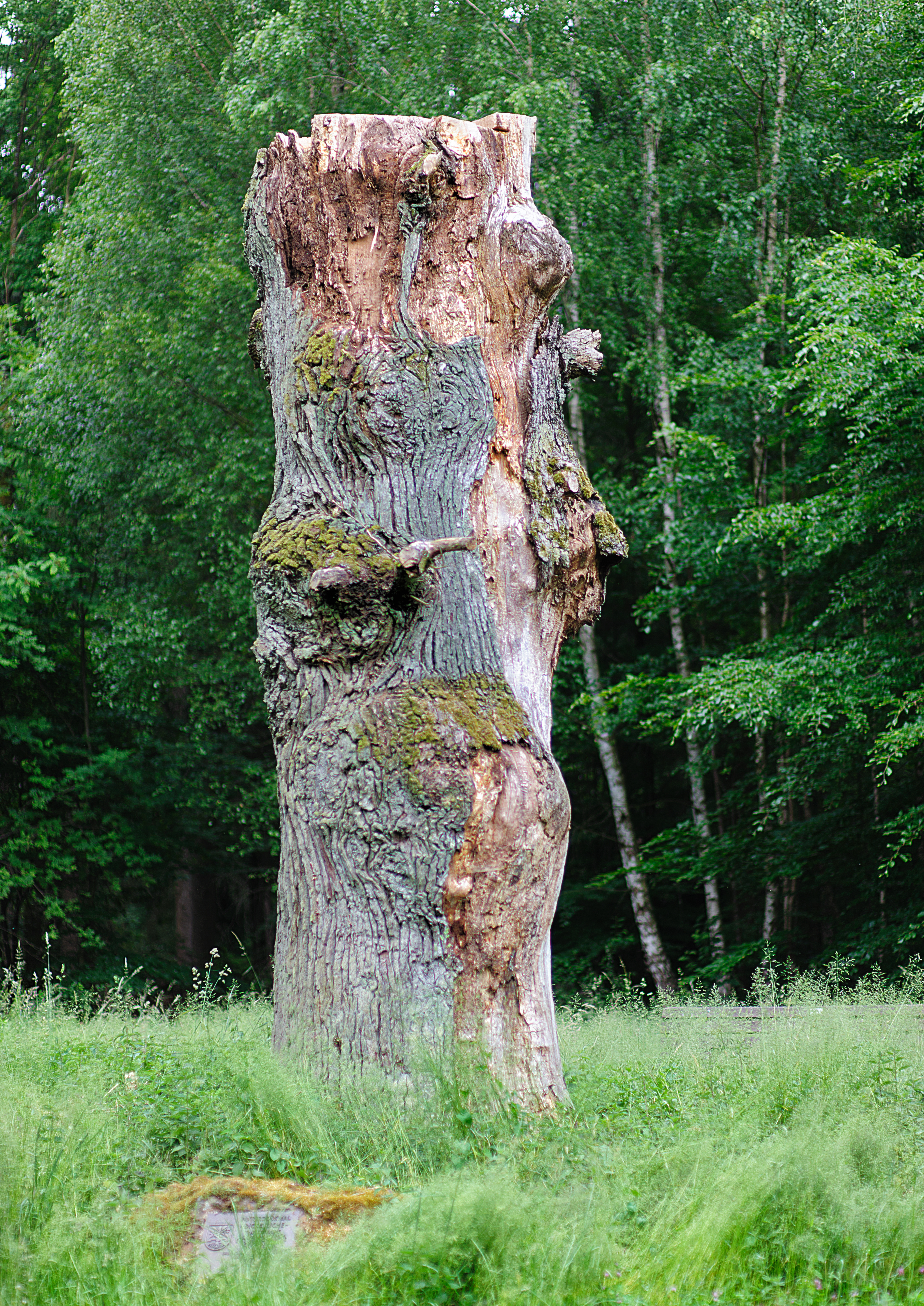 Naturdenkmal „Dicke Eiche“, Kleinottweiler, Saar-Pfalz-Kreis. So sieht sie 2014 aus.